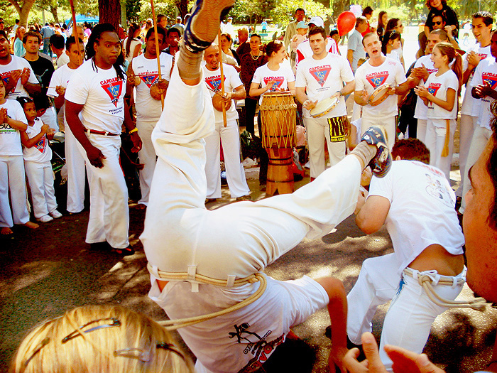 Roda de capoeira no Parque da Redenção, Porto Alegre, Brasil.